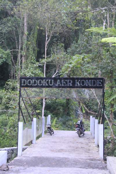 Objek Wisata Dodoku Aer Konde